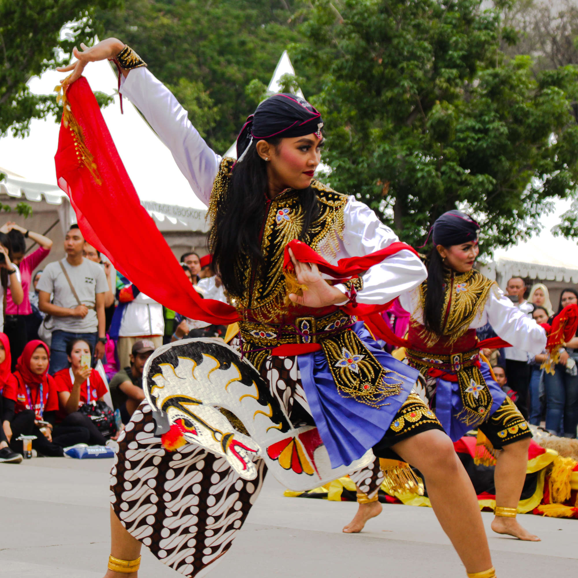 Penari Jathil, salah satu tokoh dari Reog Ponorogo dan merupakan jenis tarian kuda lumping. Kuda Lumping adalah salah satu kesenian tradisional Jawa yang menggambarkan sekelompok prajurit penunggang kuda. Selain menyuguhkan gerak tari, tarian ini juga terdapat unsur magis karena ada beberapa ritual yang di lakukan dalam tarian ini. Kuda Lumping sangat populer di masyarakat Jawa, khususnya Jawa Tengah, Jawa Timur, dan sekitarnya.